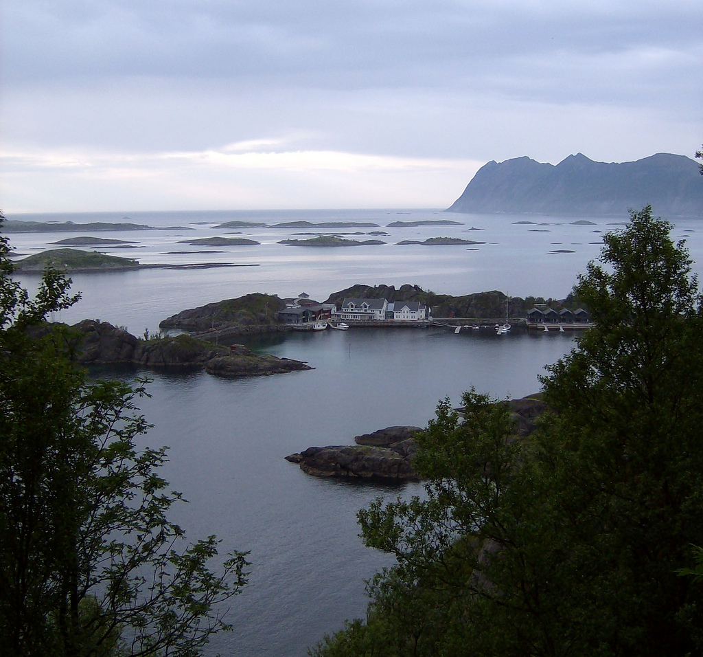 View of Hamn i Senja, Norge